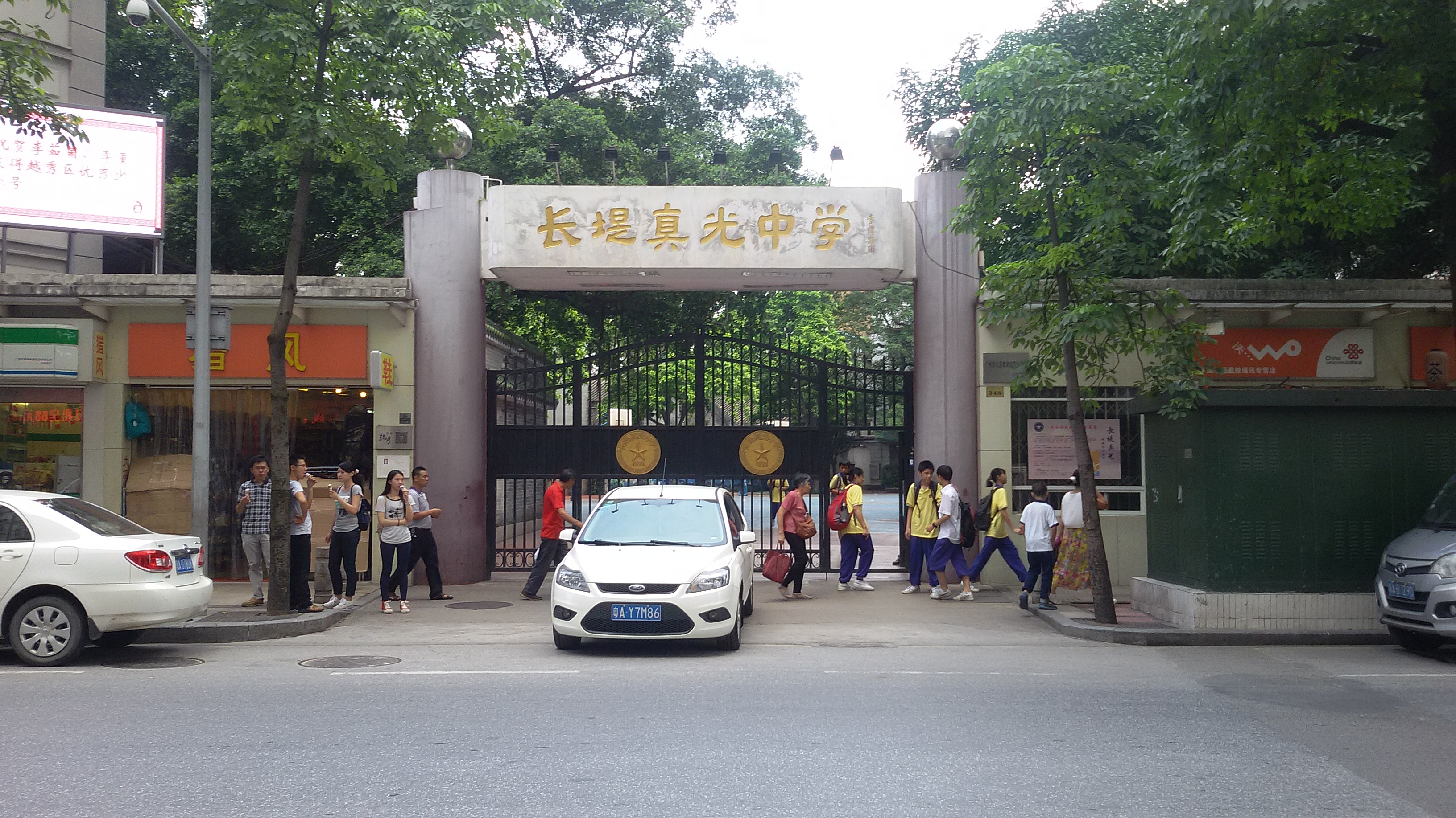 粵語: 長堤真光中學